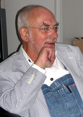 Peter Lustig in Mainz, Pressekonferenz 25 Jahre Löwenzahn